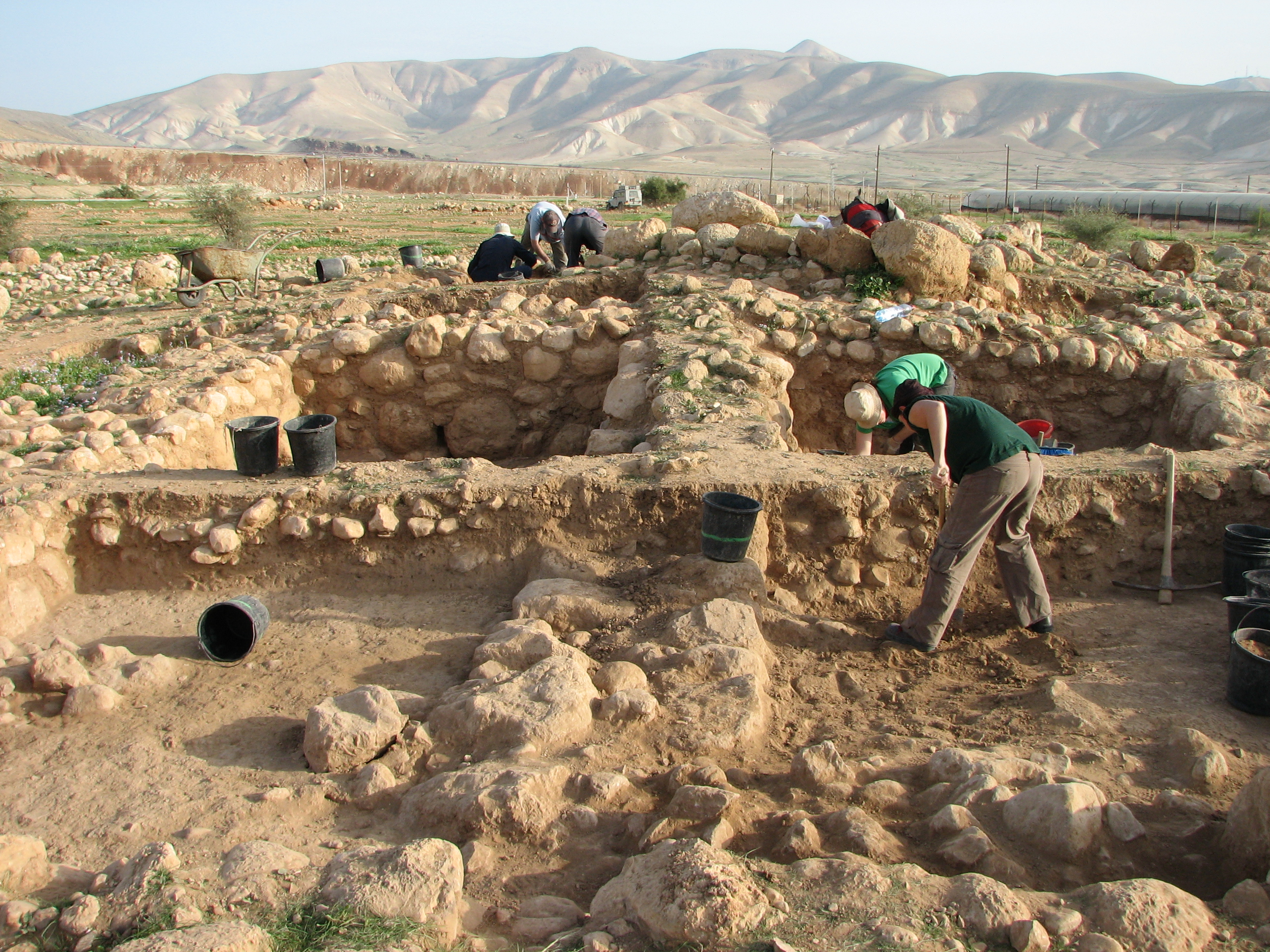 Fatzael 7 Chalcolithic Archaeology site in Fatzael Valley in the west side of Jordan Valley, Pictures from February 2010 excavation season אתר הארכאולוגי פצאל 7 מתוארך לתקופה הכלקוליתית, נמצא בבקעת פצאל בבקעת הירדן. צילומים מתוך עונת החפירות של פברואר 2010